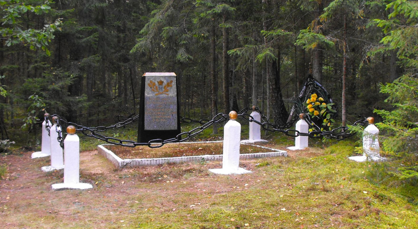 Памятник партизанам отряда 106, убитым в последнем бою 6 июля 1944 года. Возведен в 1964 году в Налибокской пуще бывшим командиром отряда Шоломом Зориным вместе с боевыми товарищами.